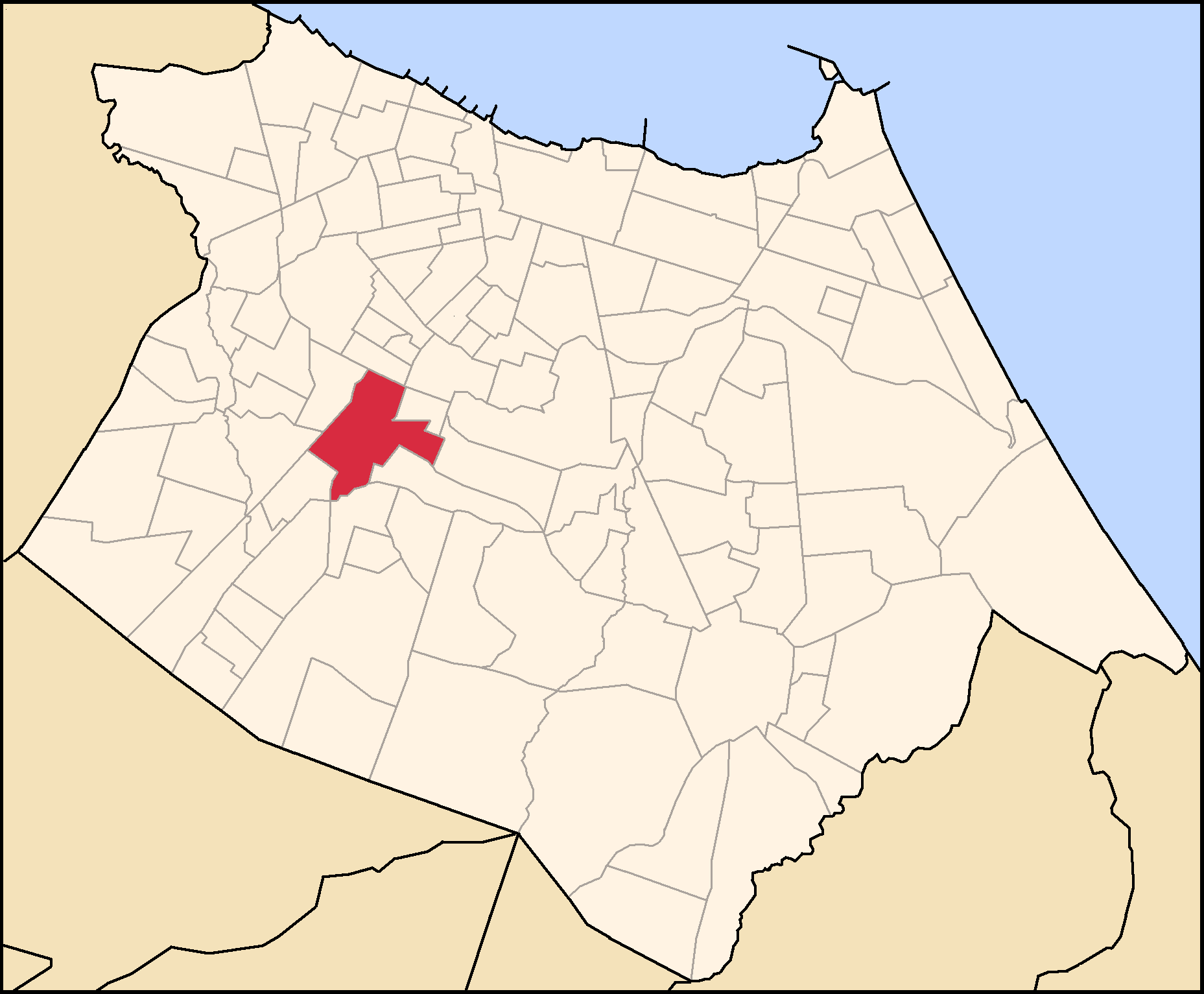 Fortaleza com detalhe para a Parangaba